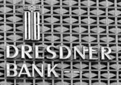 Einkaufszentrum "Schweizer Ladenstraße" in Opernhaus-Nähe Information added by Wikimedia users.